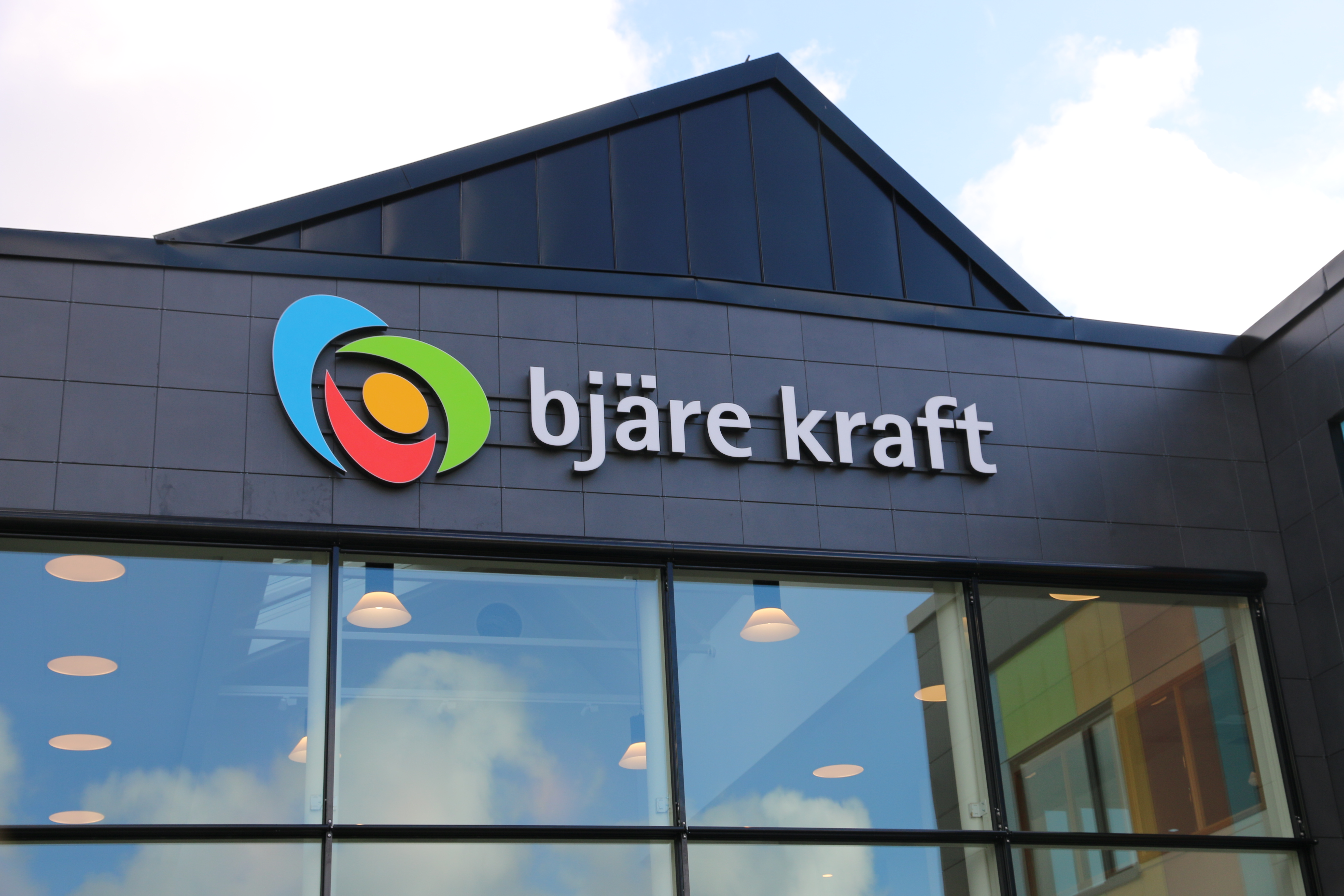 Bjäre Kraft i Förslöv